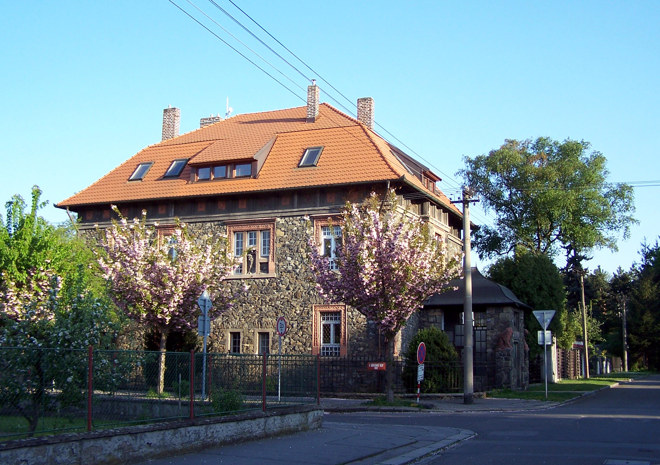 Kamenná vila v Pardubicích.